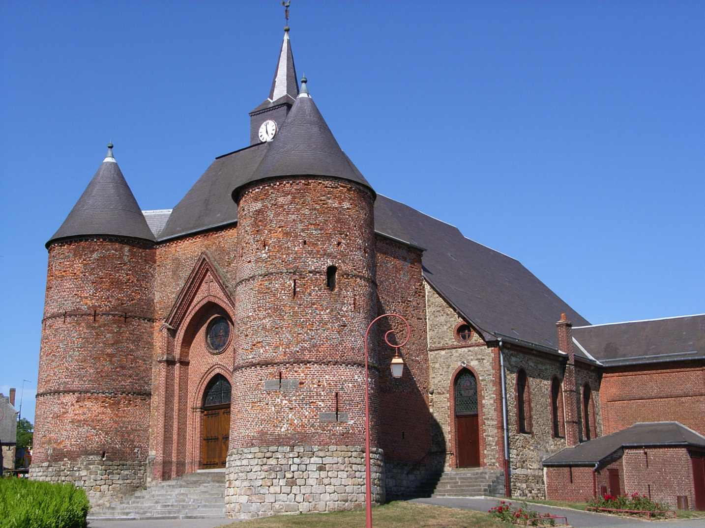 Saint-Martin de Wimy, église fortifiée (fortification entre 1578 et 1585) (Dep. Aisne, France)